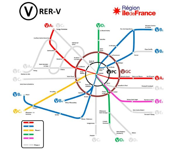 Plan annexé à la délibération de la région du 27 mai 2020